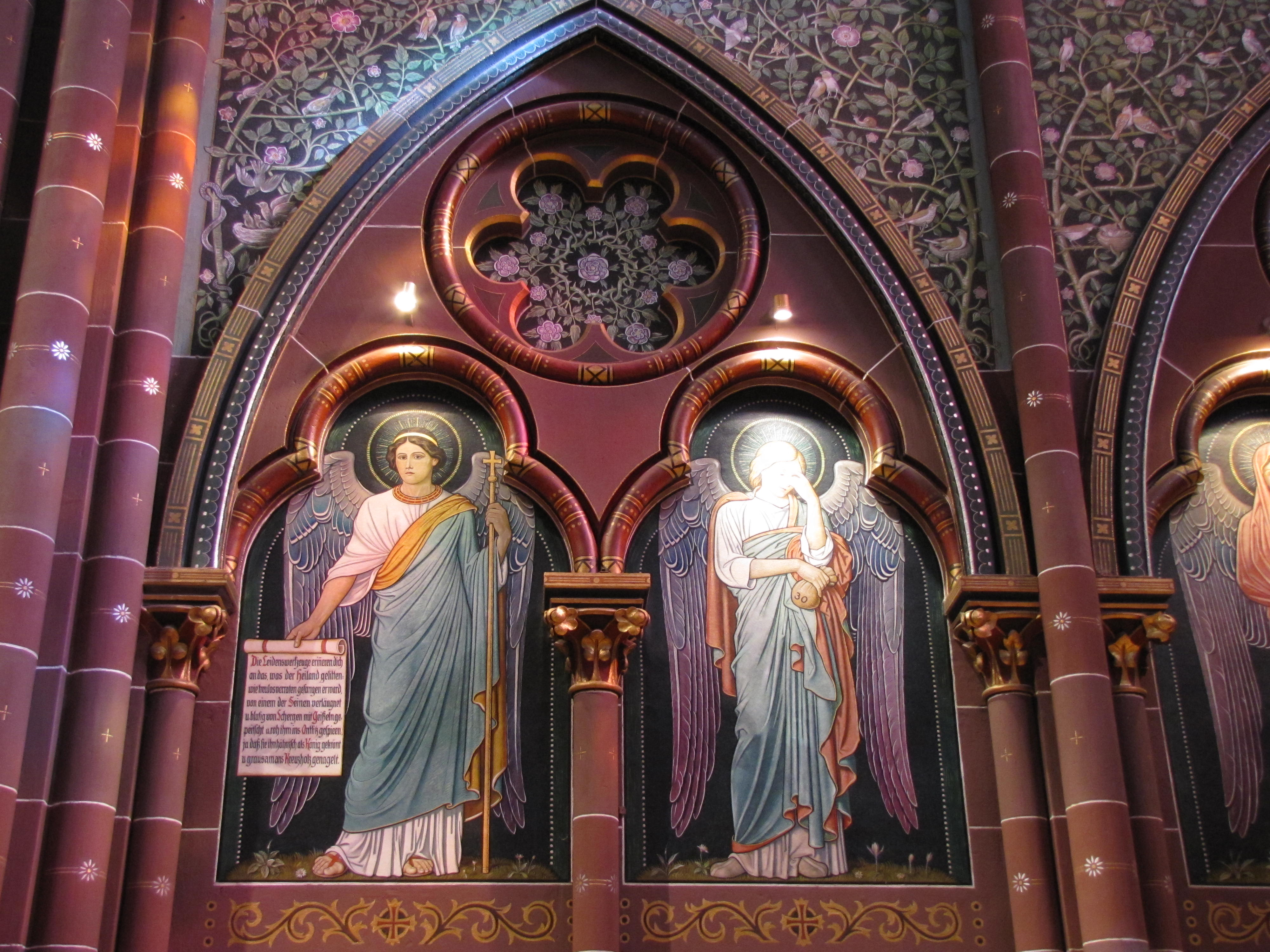 Alsace, Bas-Rhin, Chapelle du Prieuré des Carmélites du Sacré-Cœur de Marienthal (IA00062023).Fresques néo-gothiques.